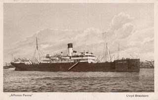 Fotografia do vapor brasileiro Affonso Penna (ex-Minas Gerais). A fotografia foi tirada provavelmente no final da década de 1920, ocasião da reestruturação da Companhia Lloyd Brasileiro, na qual todos os navios da frota retratados em cartões postais de propaganda da empresa. O navio foi afundado em 02 de março de 1943 pelo submarino italiano Barbarigo.